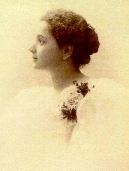 Johanna Geissmar, Fotograf Conrad Ruf